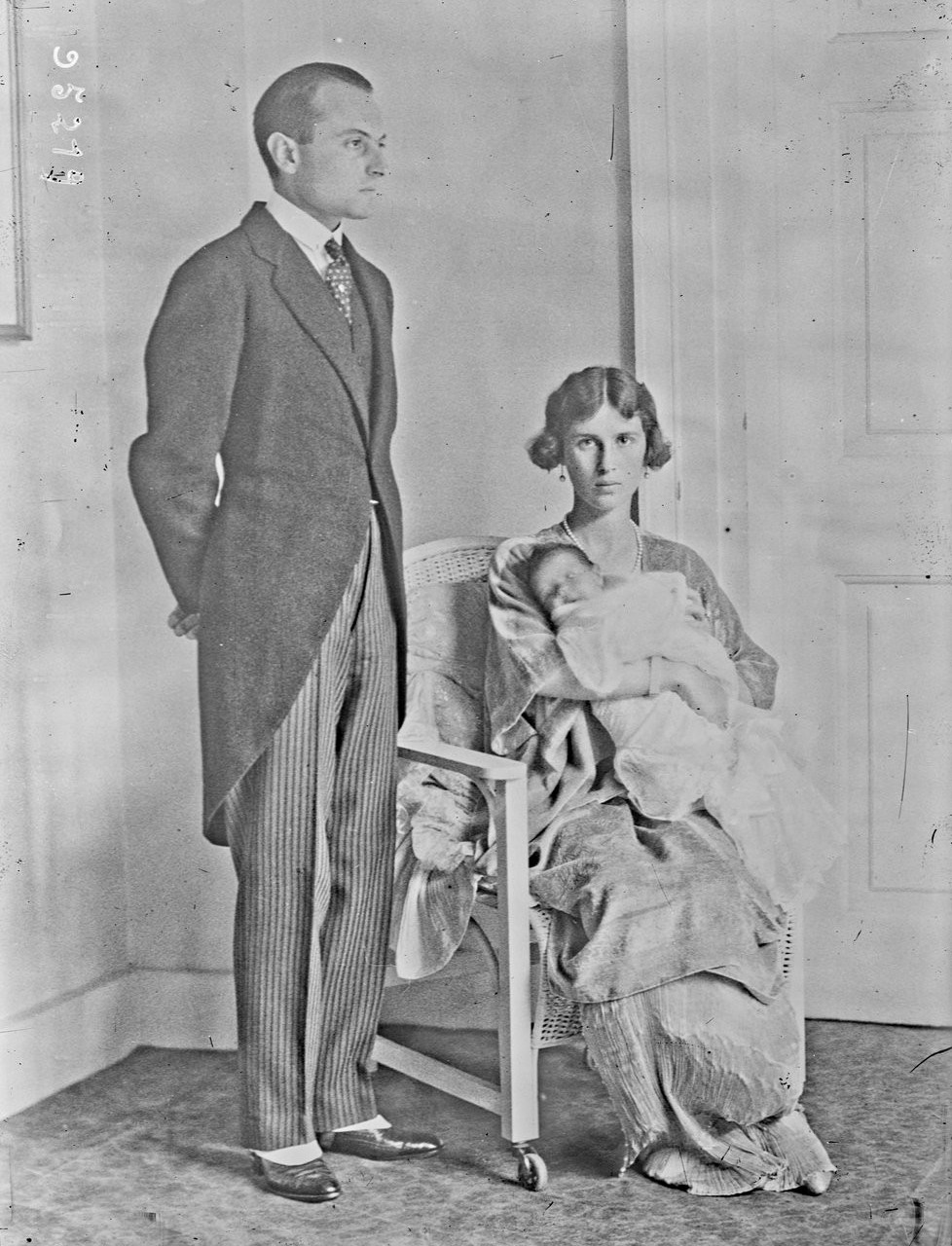 Prince et princesse Paul de Serbie et leur enfant.